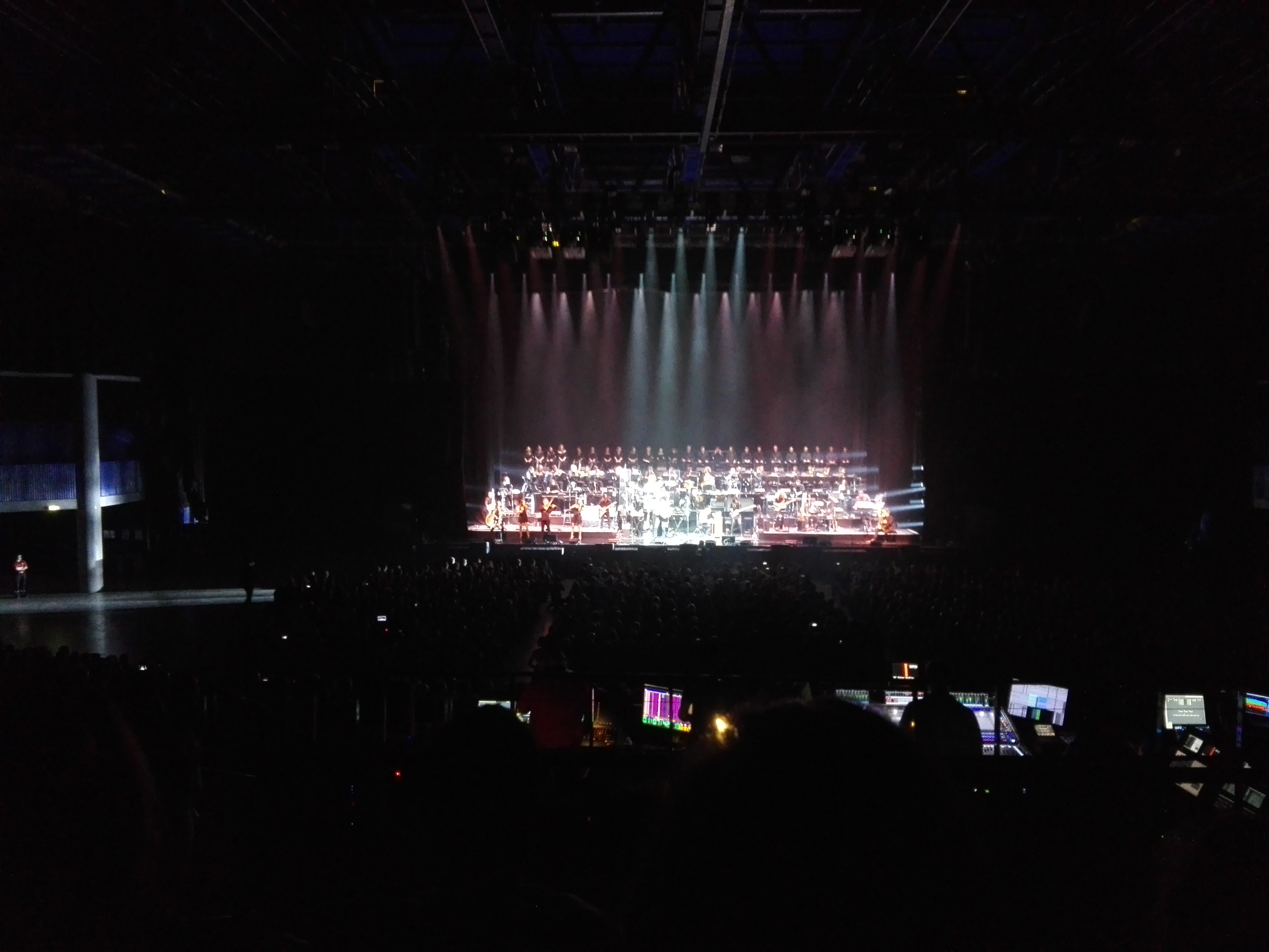 Concert donné par Hans Zimmer, le jeudi 2 juin 2016 au Zénith Nantes Métropole de Saint-Herblain.